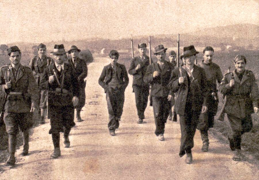 Italijanski vojaki in pripadniki vaške straže peljejo talca na strelišče